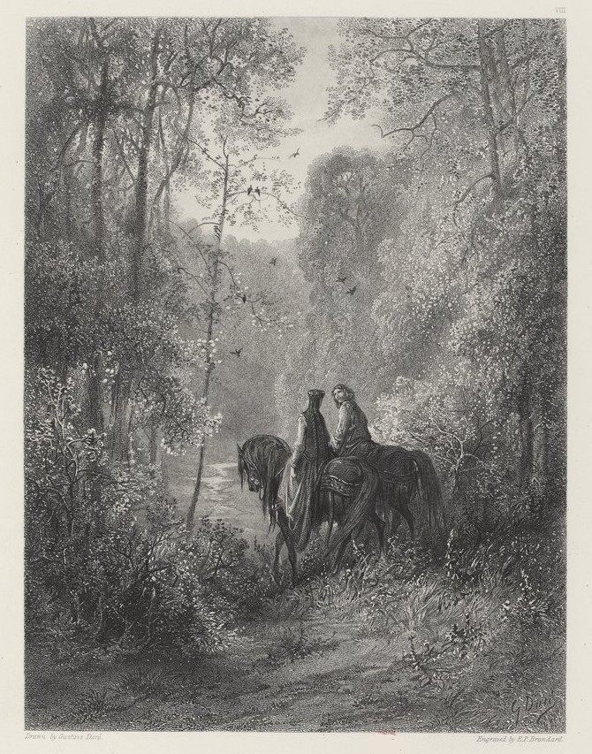 "Ils s'égarèrent sous des bosquets qui semblaient un paradis de fleur", dessin de Gustave Doré pour illustration du poéme "Genièvre" de Alfred Tennyson